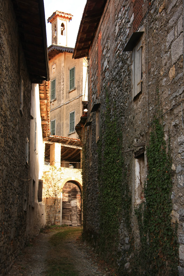 Scorcio della frazione medioevale Campiglia nel comune di Nebbiuno (NO)